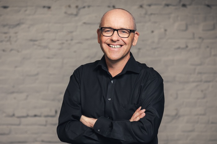 Alessandro Nasini, Geschäftsführer Bavaria Entertainment GmbH